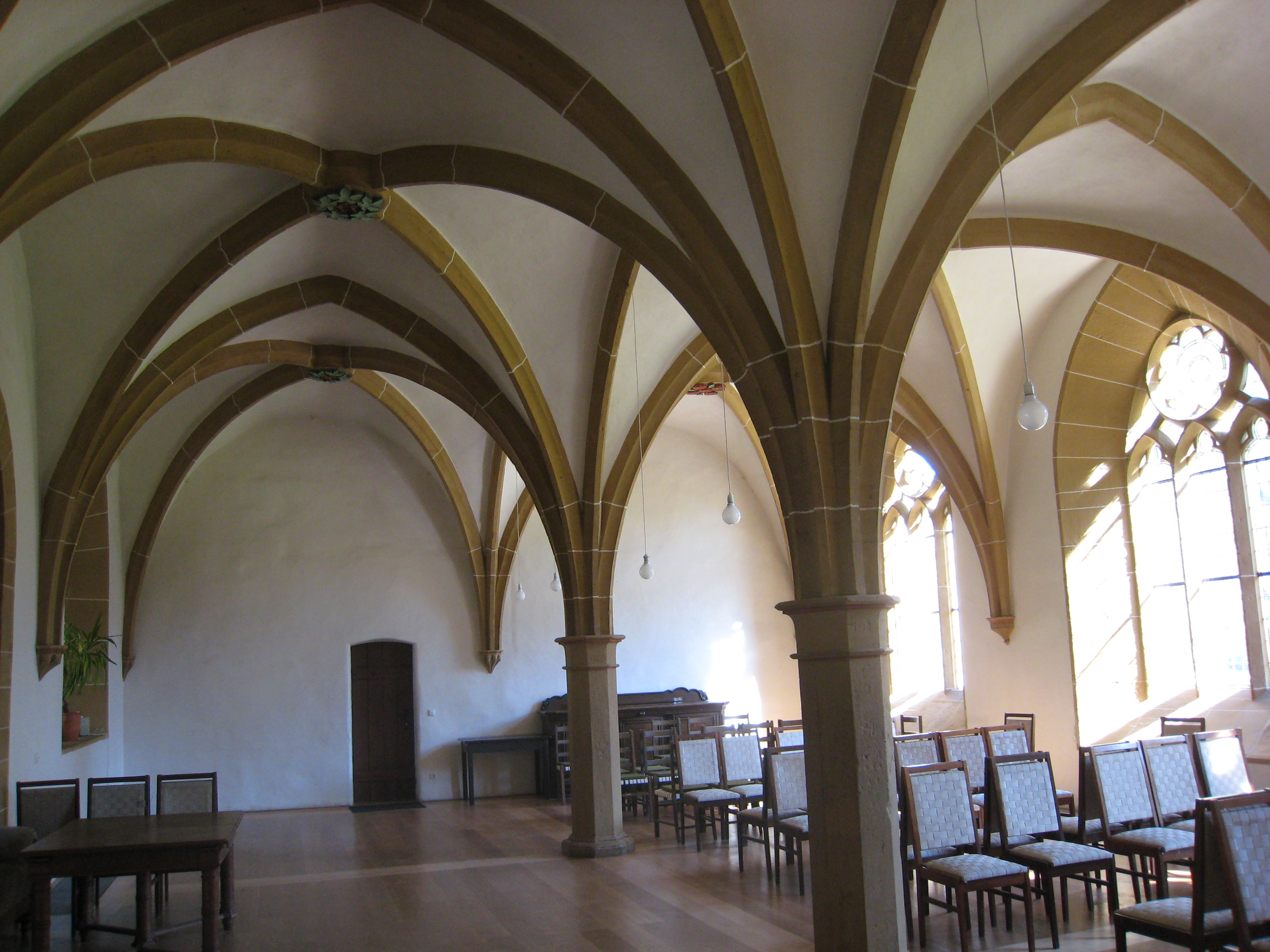 Kapitelsaal des Predigerklosters in Erfurt.